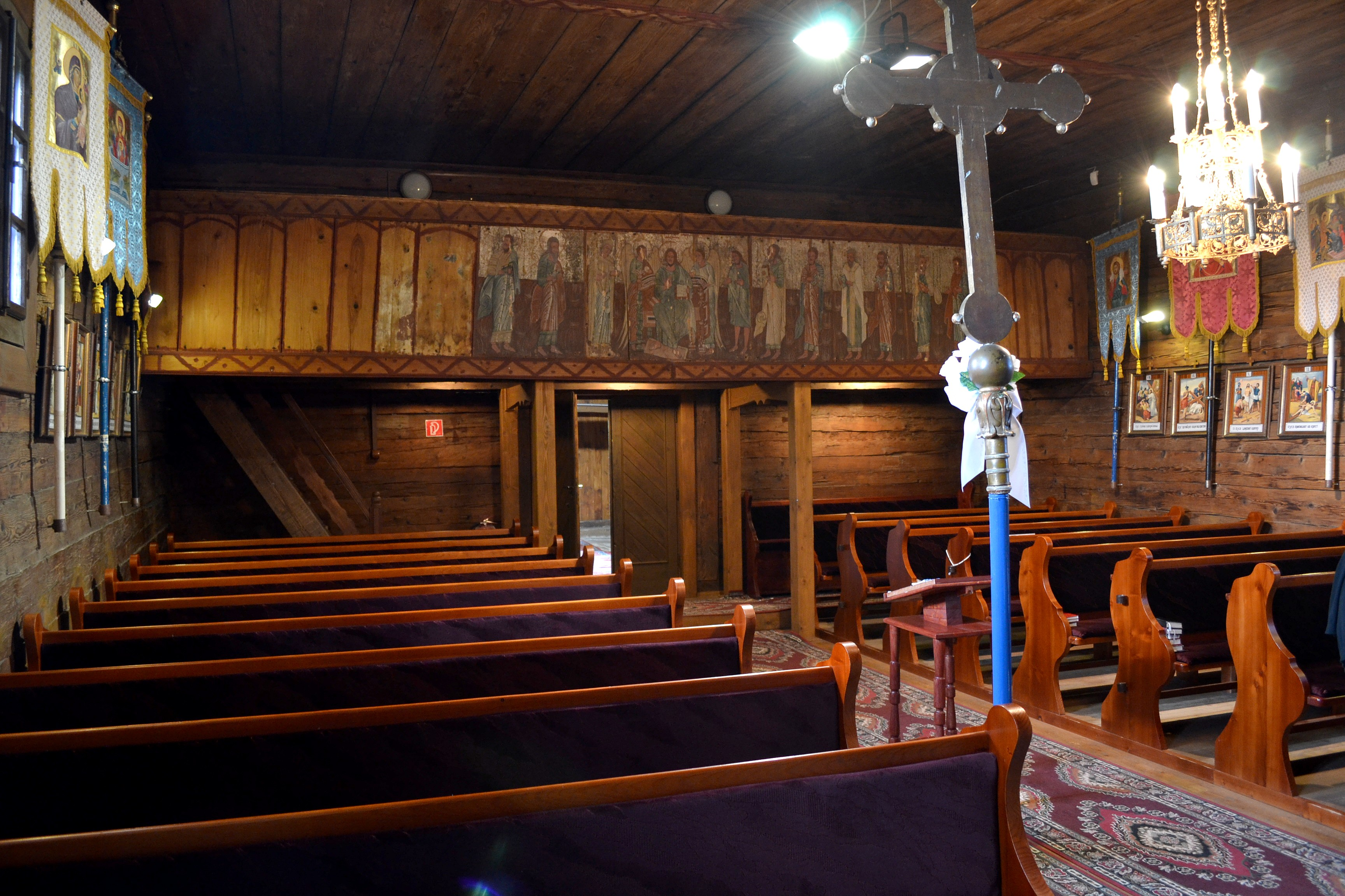 Pohľad do lode chrámu